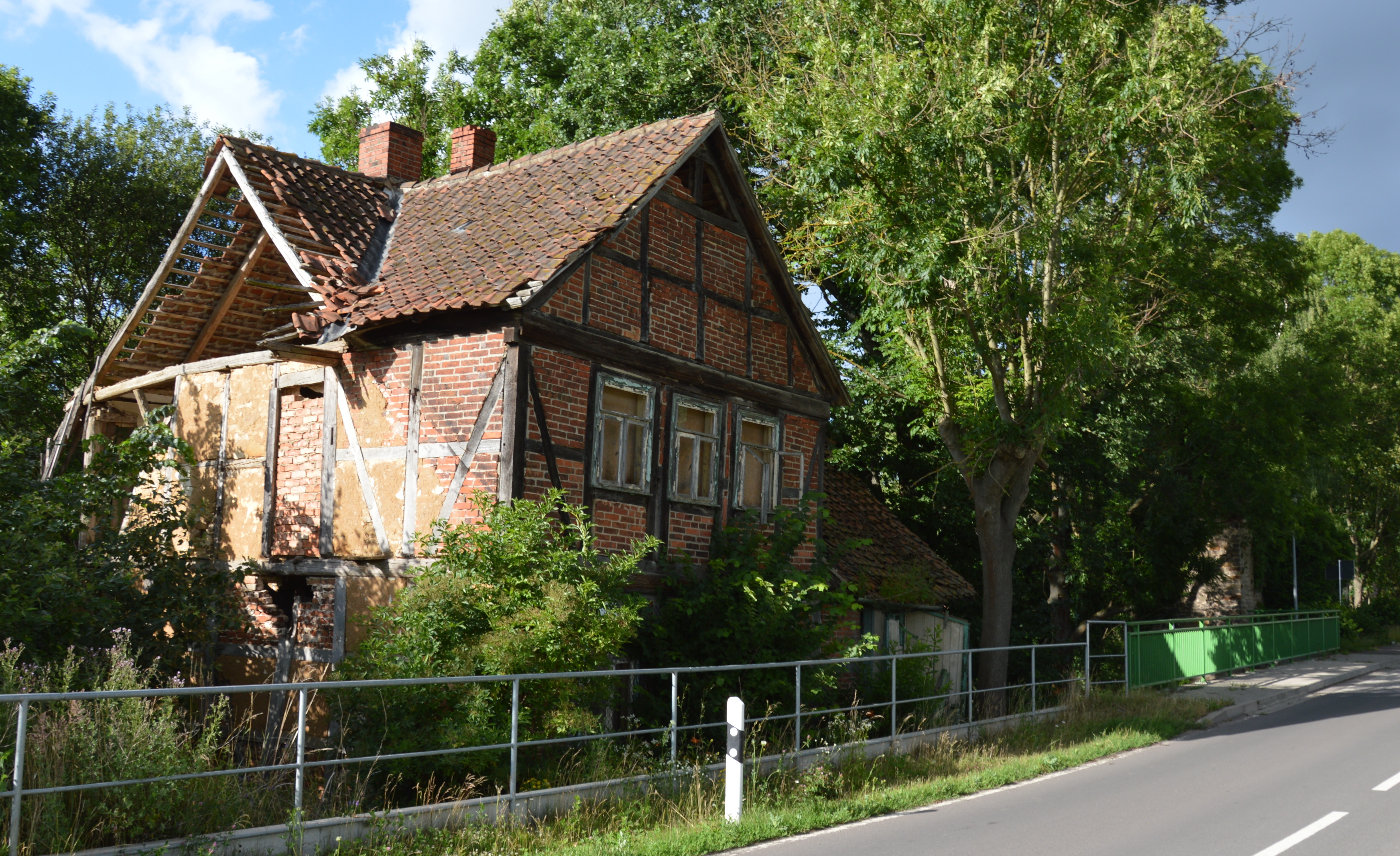 Dorfstraße (Groß Bartensleben) Mühle